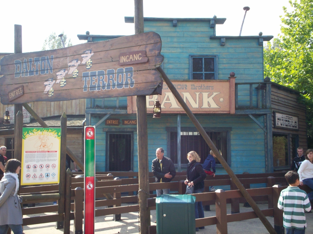 Cowboydorp in Walibi Belgium